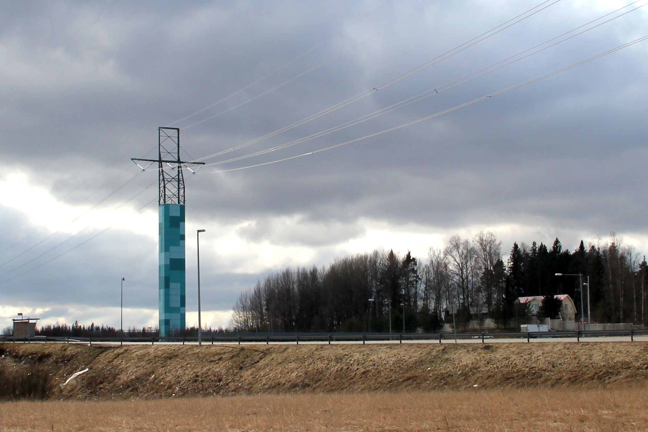 Porintien eli 2-tien liittymä Vihdin Nummelassa. Jorma Valkaman maisemapylväs vuodelta 2003